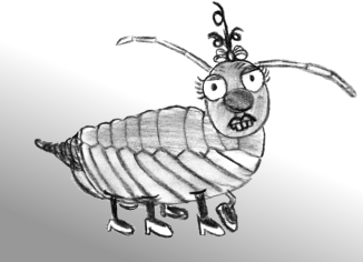 Steinlausweibchen, frei nach Loriot.